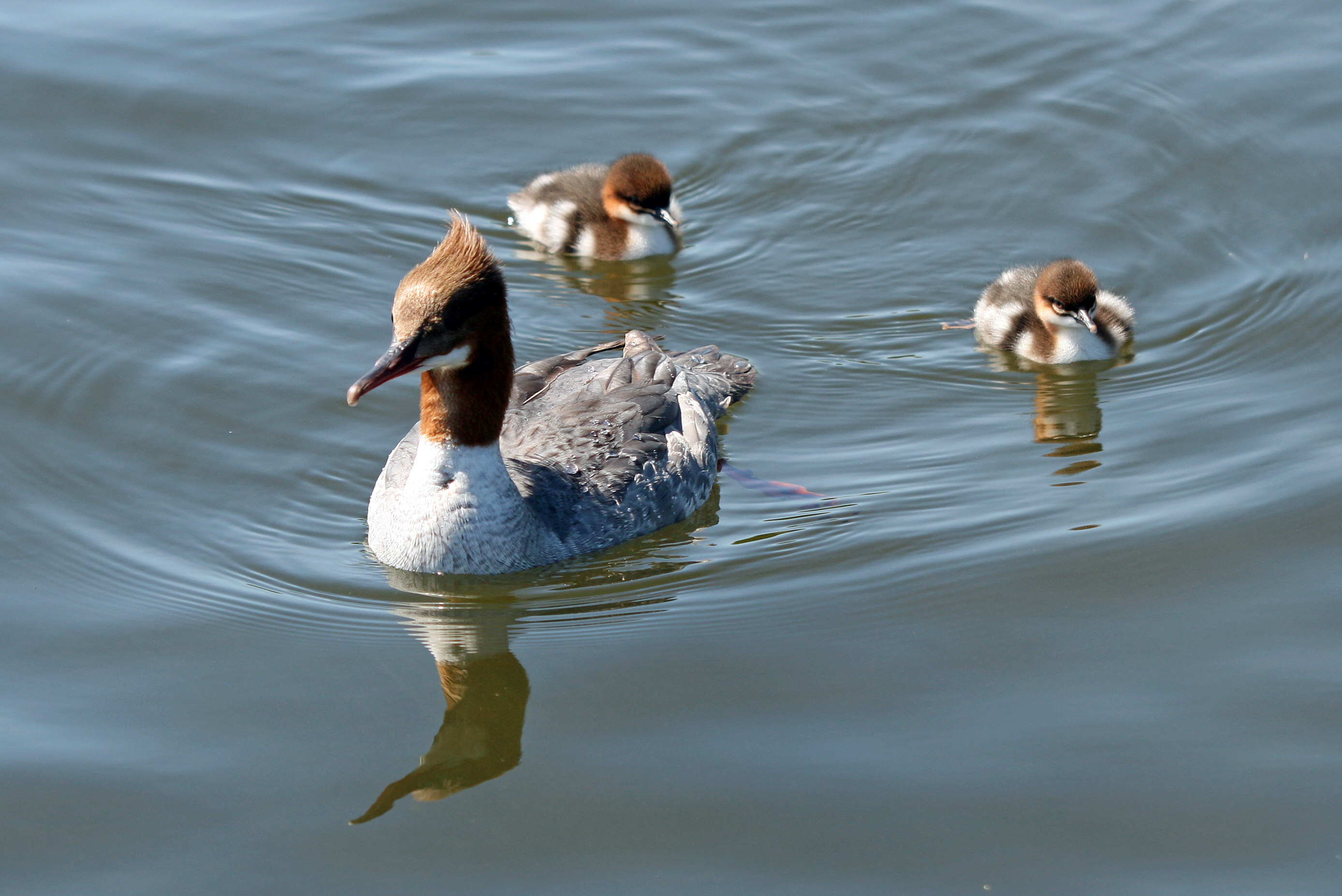 Eigene Aufnahmen, zuerst veröffentlicht hier: Gänsesäger (Mergus merganser), Weibchen mit Küken, Fontänenteich Schloß Nymhenburg, München